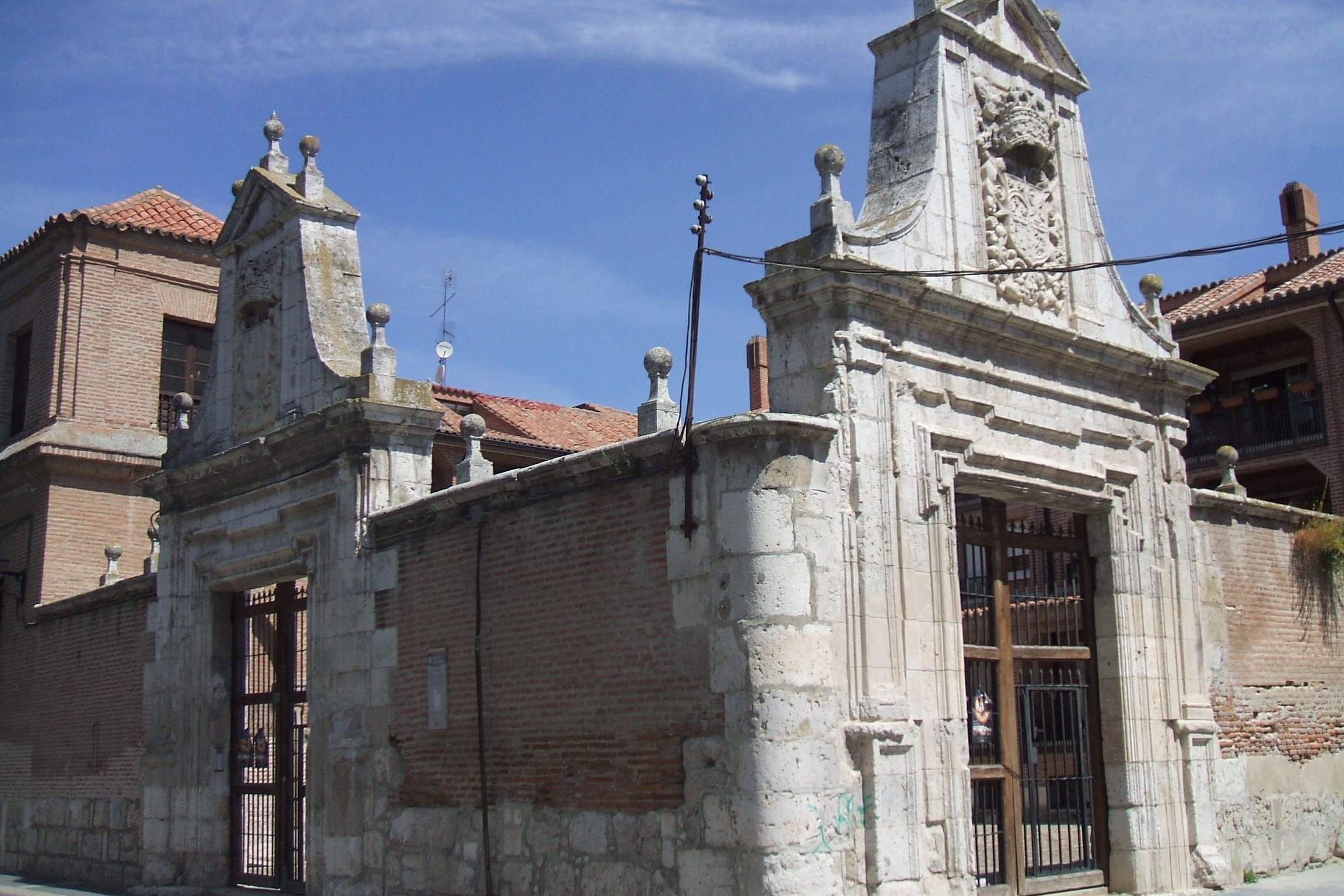 Palacio del Almirante (Medina del Campo)